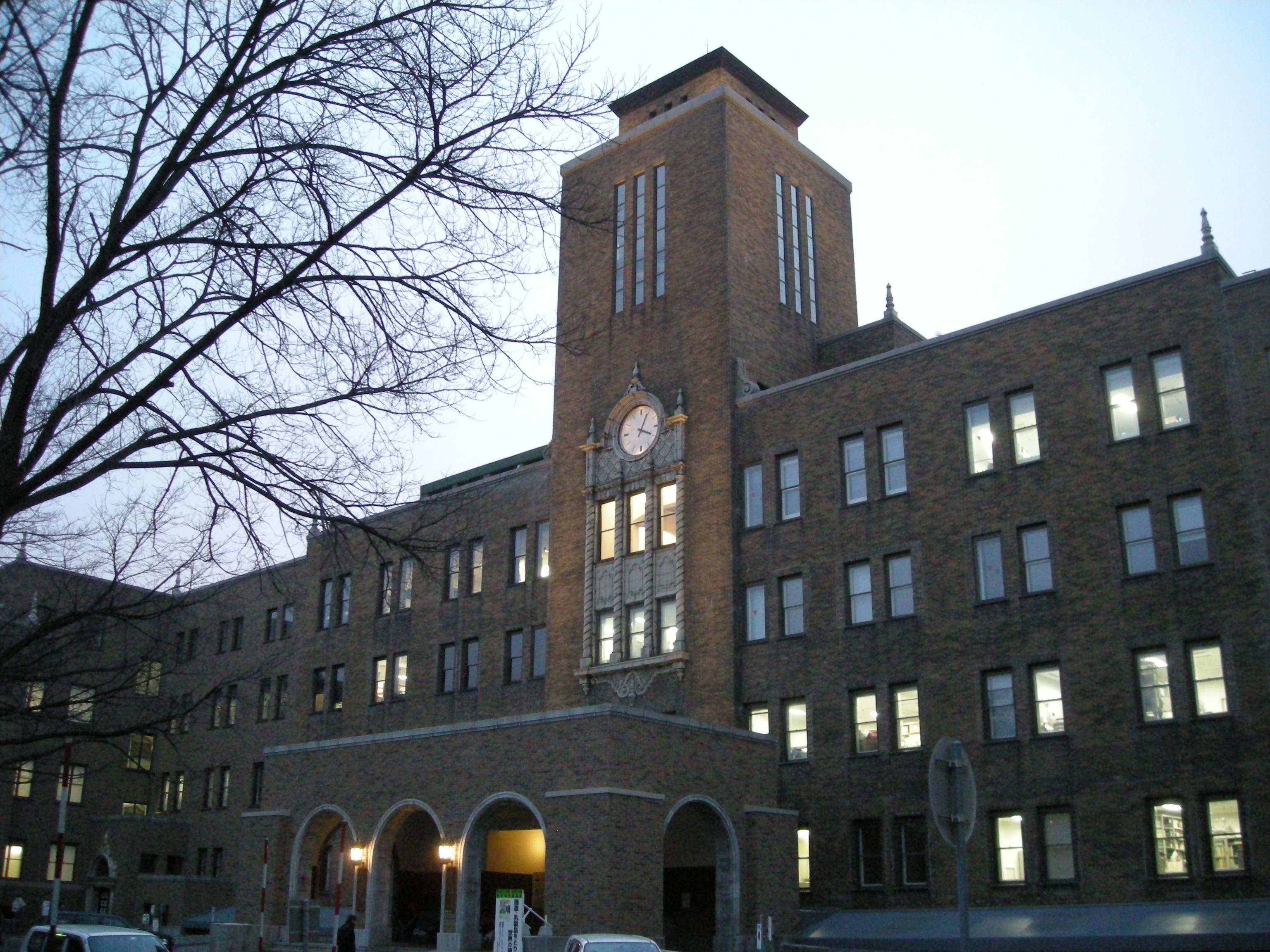 Hokkaido Univ.／北大農学部